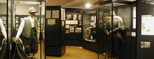 Blick auf den Eingangsbereich des Museums 1915-18 in Kötschach-Mauthen. Zu sehen sind Figurinen mit italienischen bzw. österreichisch-ungarischen Uniformen. Im Hintergrund zeigen Bildwände historische Fotos der Gebirgsfront im Ersten Weltkrieg.